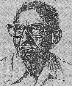 हिंदी साहित्यकार अम्बिका प्रसाद दिव्य।